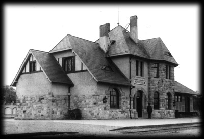 Der Worms-Herrnsheimer Bahnhof auf der Bahnstrecke Worms-Gundheim in Rheinhessen (Deutschland)